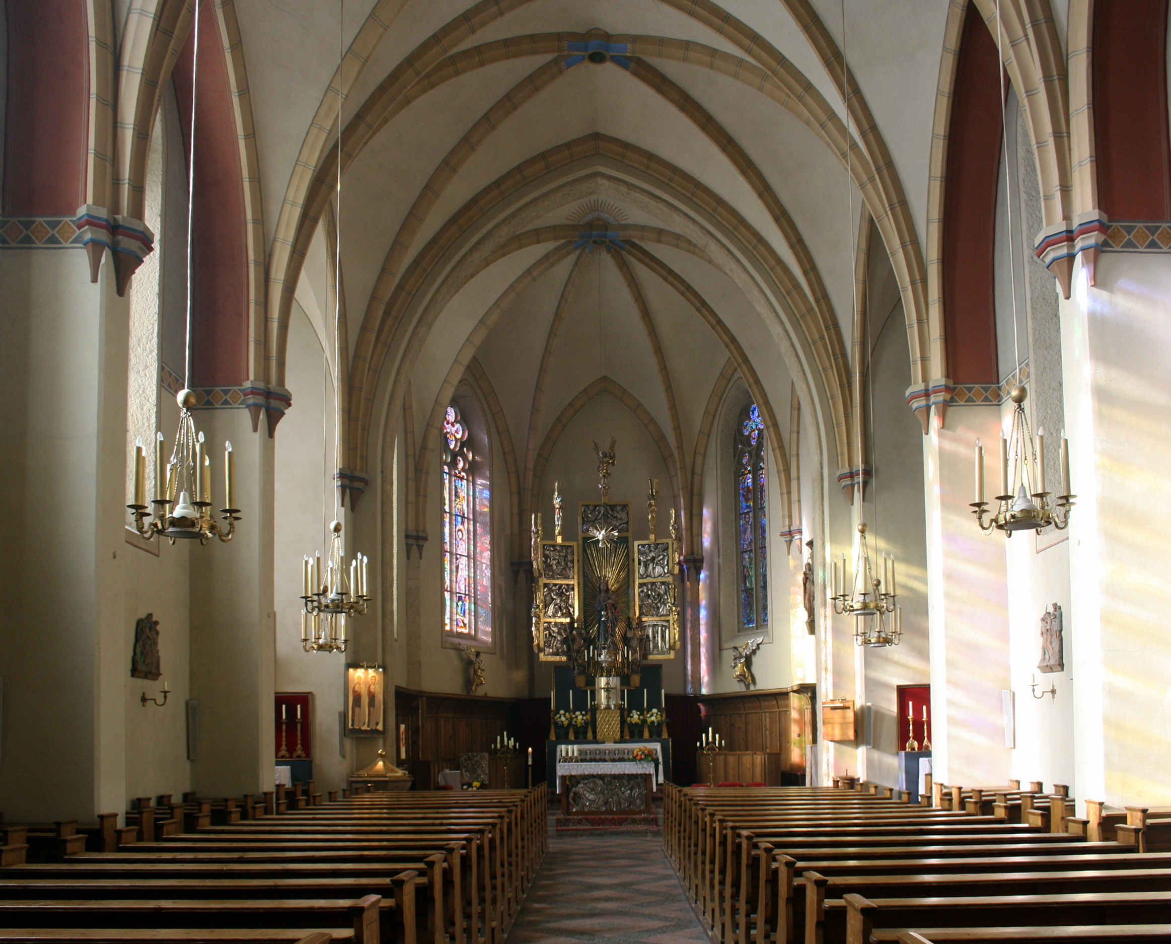 Bad Gastein - Innenraum der Sankt Preimskirche.jpg